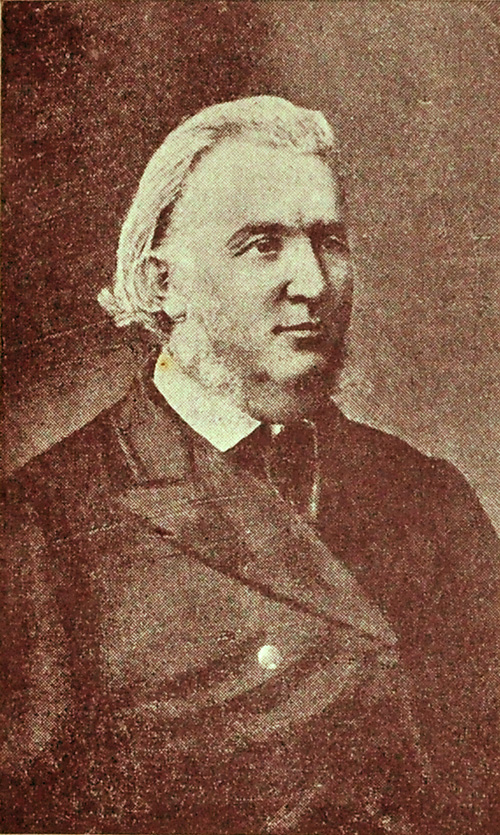 Галицький письменник, політик, видавець, церковний і громадський діяч, греко-католицький (1851), а згодом православний священник, один із провідників галицького москвофільства, засновник Общества імені Михайла Качковського Іван Наумович.